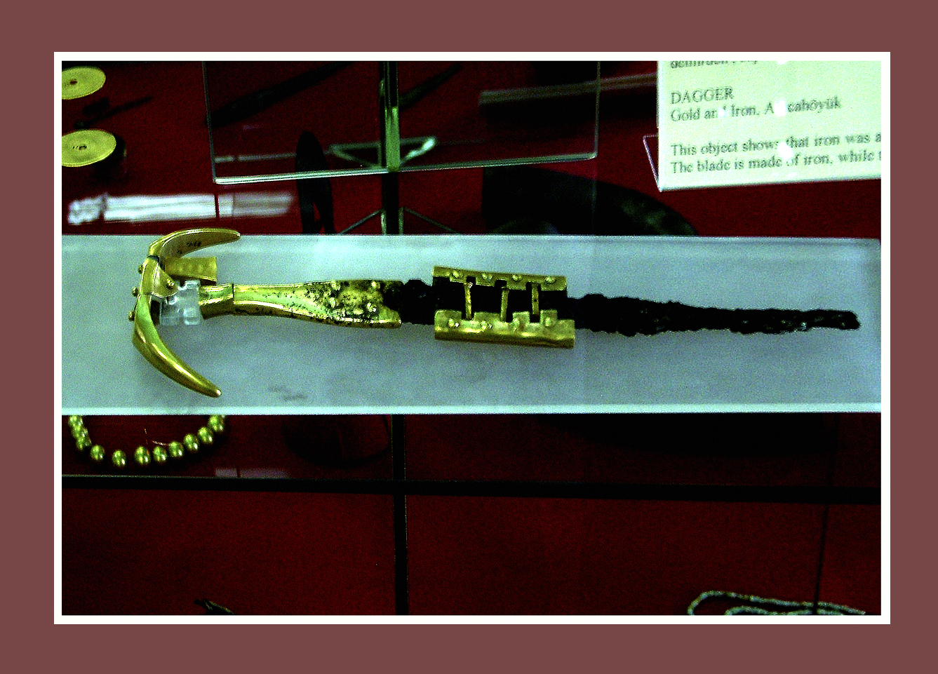 Kora bronzkori tőr (Anatóliai Civilizációk Múzeuma, Ankara, Törökország)